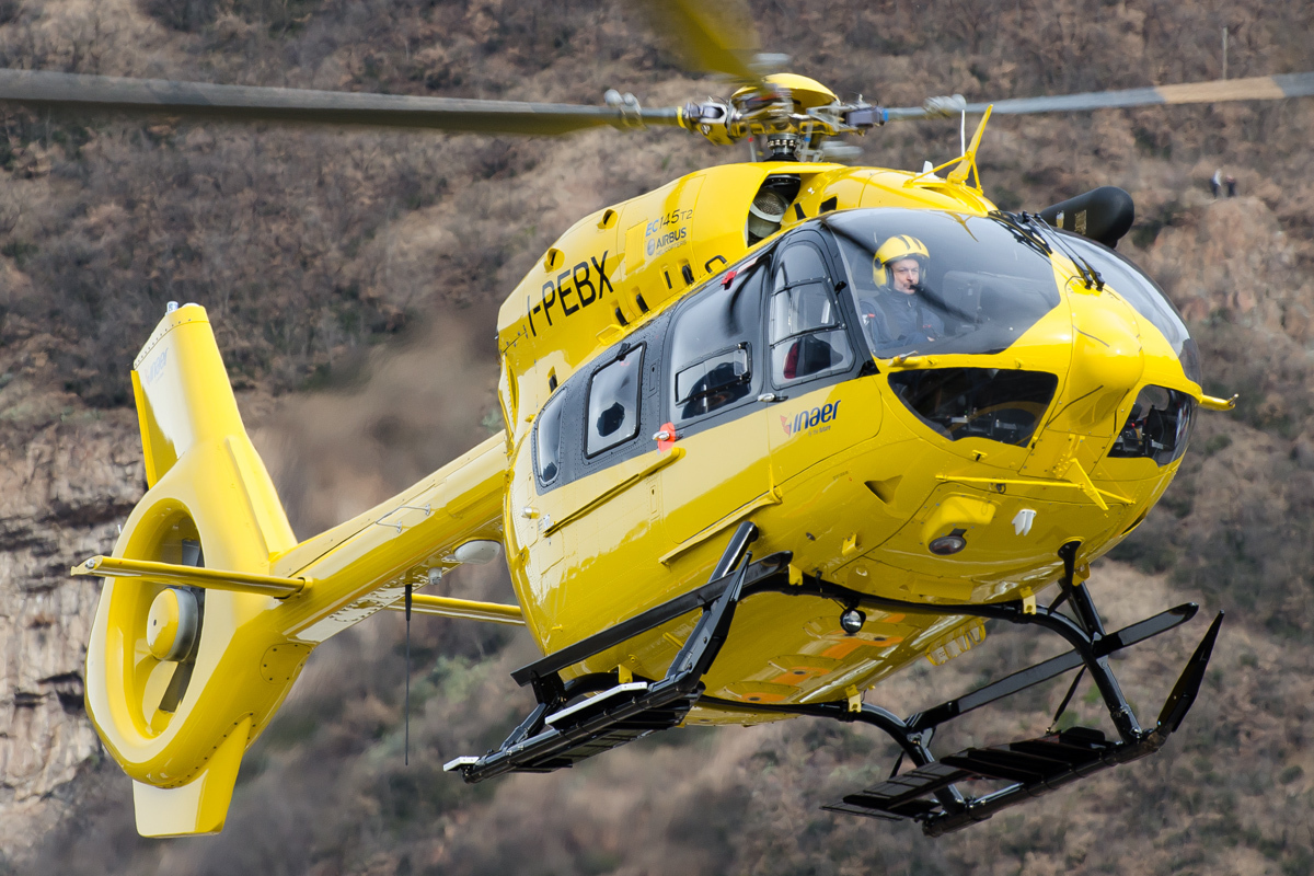 Reg: I-PEBX Aircraft: Airbus Helicopters EC145 T2 Airline: Inaer Serial #: 20003 at Bolzano Ospedale Generale Regionale San Maurizio (Italy)